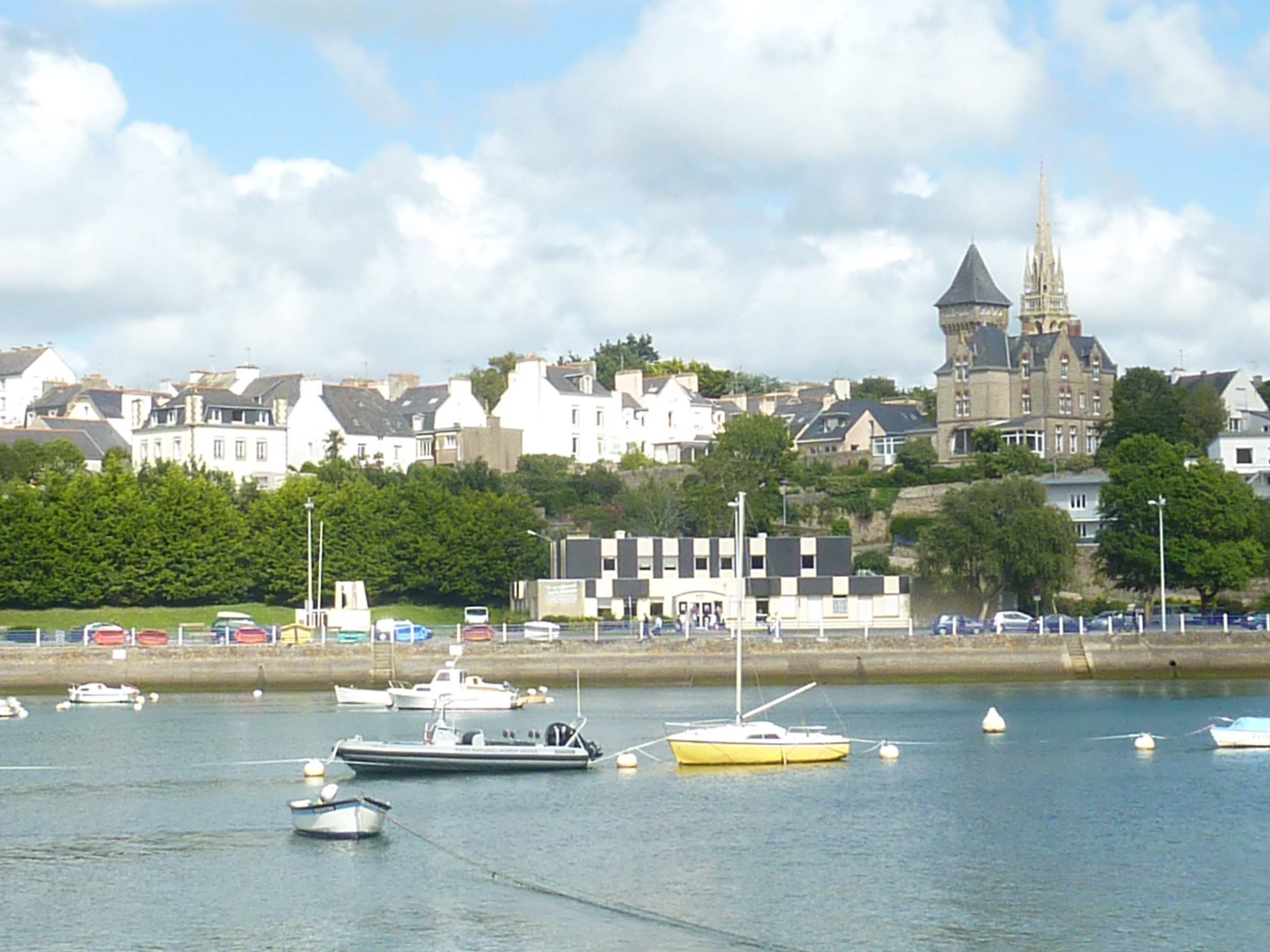 Douarnenez : le centre-ville et la chapelle Saint-Michel vus depuis Tréboul